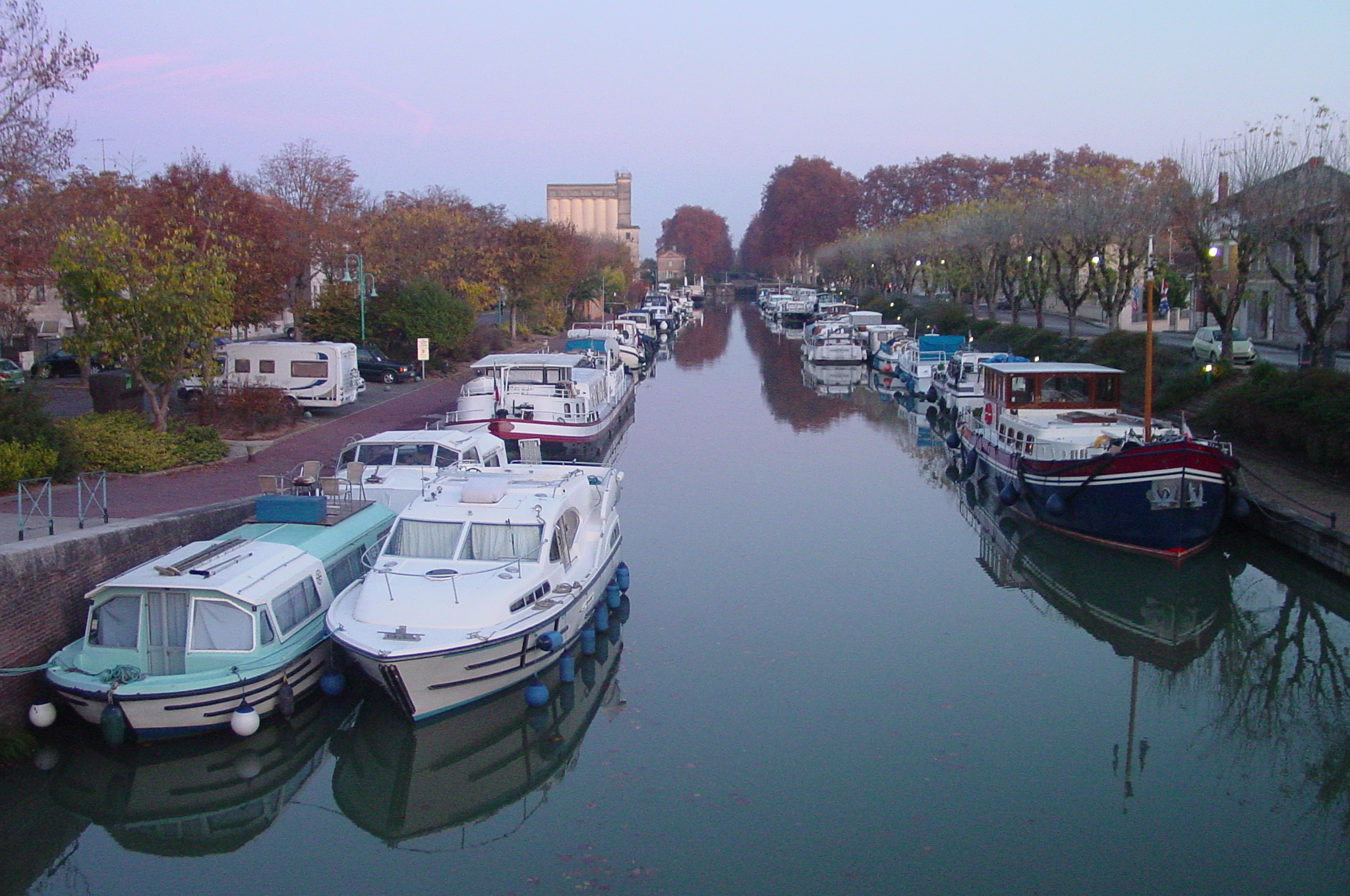 Sur le canal de Garonne, le beau port à Moissac, France